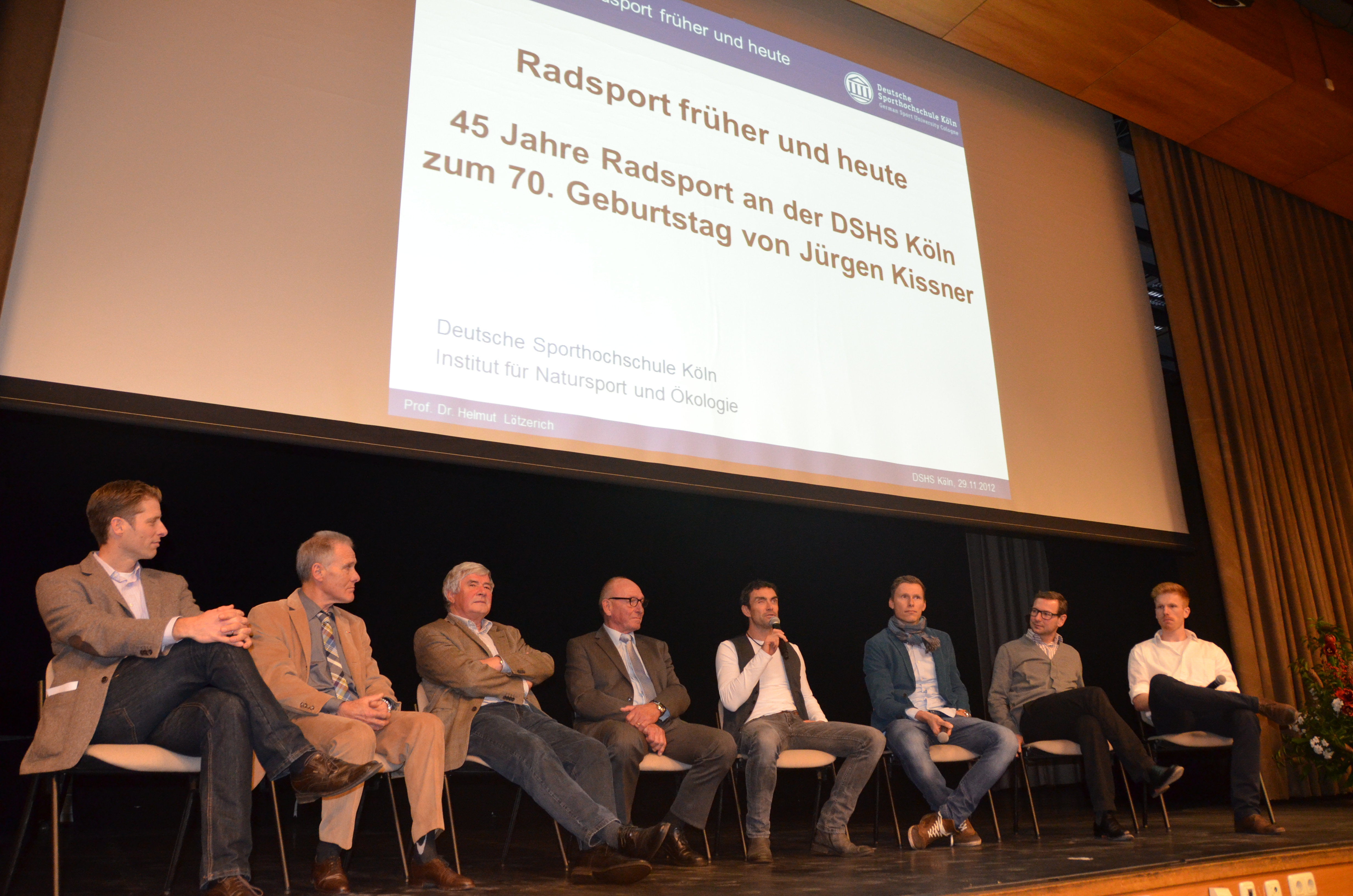 Veranstaltung "Radsport früher und heute" an der Deutschen Sporthochschule Köln am 29. November 2012, v.l.n.r.: Achim Schmidt, Udo Hempel, Karl Link, Jürgen Kißner, Marcel Wüst, Christian Knees, René Wolff, Sven Meyer